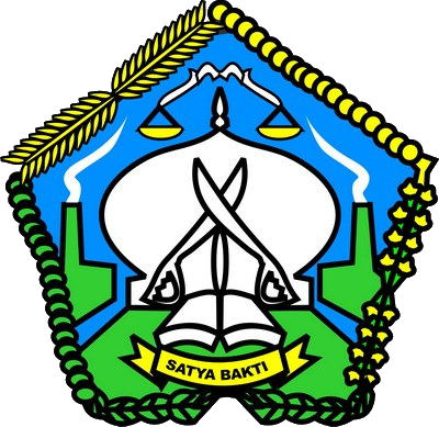 Lambang Kabupaten Aceh Selatan